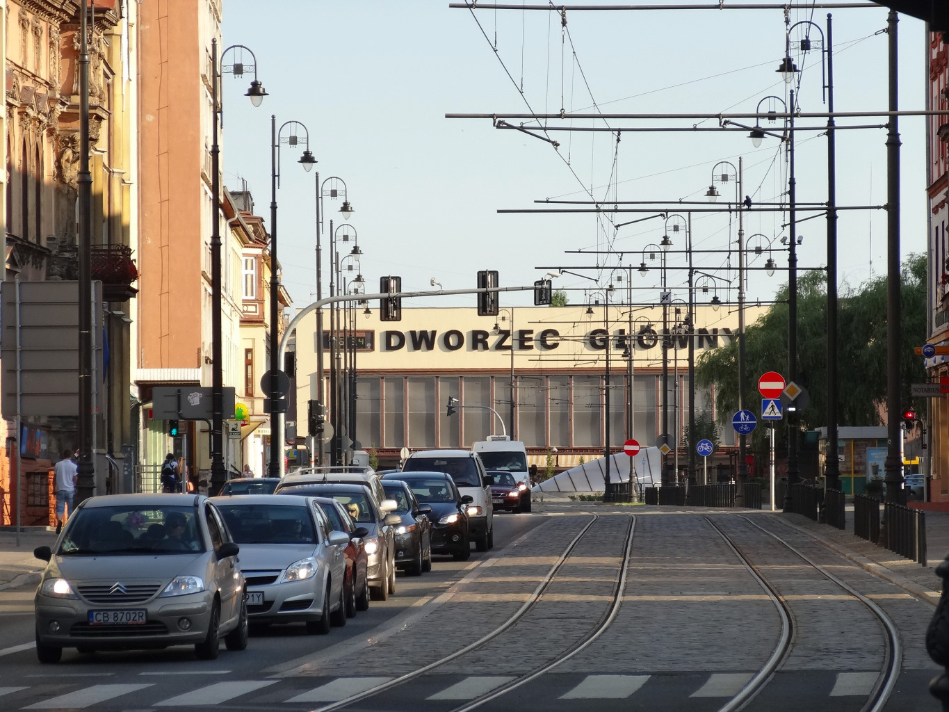 Ulica Dworcowa w Bydgoszczy na odcinku od ul. Królowej Jadwigi do dworca PKP